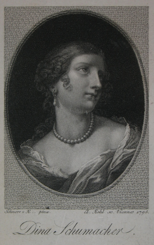 Kupferstich-Porträt der Dina Schumacher von Kohl nach Schnorr von Carolsfeld, Wien, 1795. Dina Schumacher, geb. Winhofer oder dänisch auch Vinhofvers, (geb. um 1620), war eine Mätresse des Grafen Ulfeldt am königlichen Hof in Kopenhagen, die wegen Meineids hingerichtet wurde.